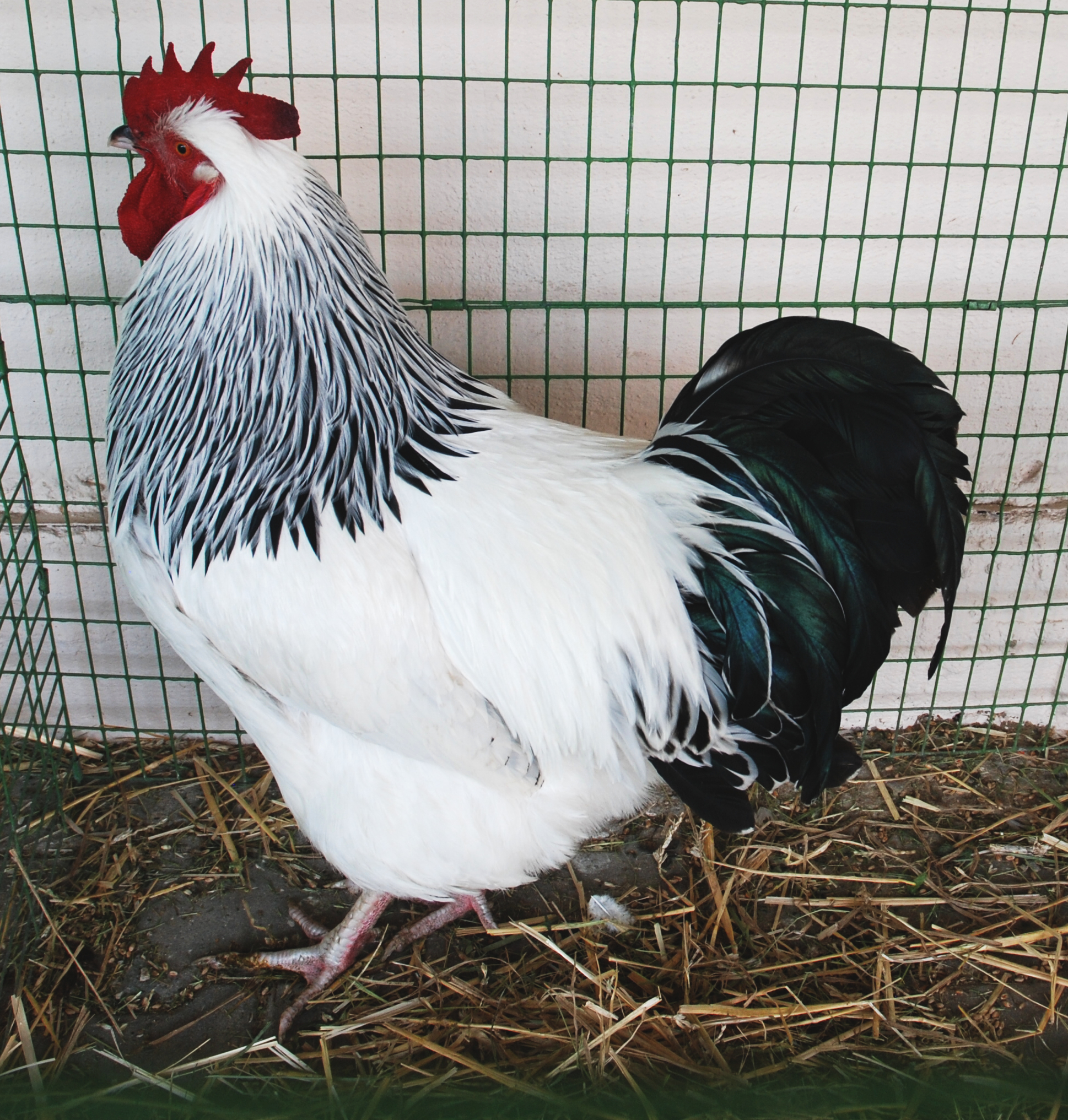 kohout sasexky světlé